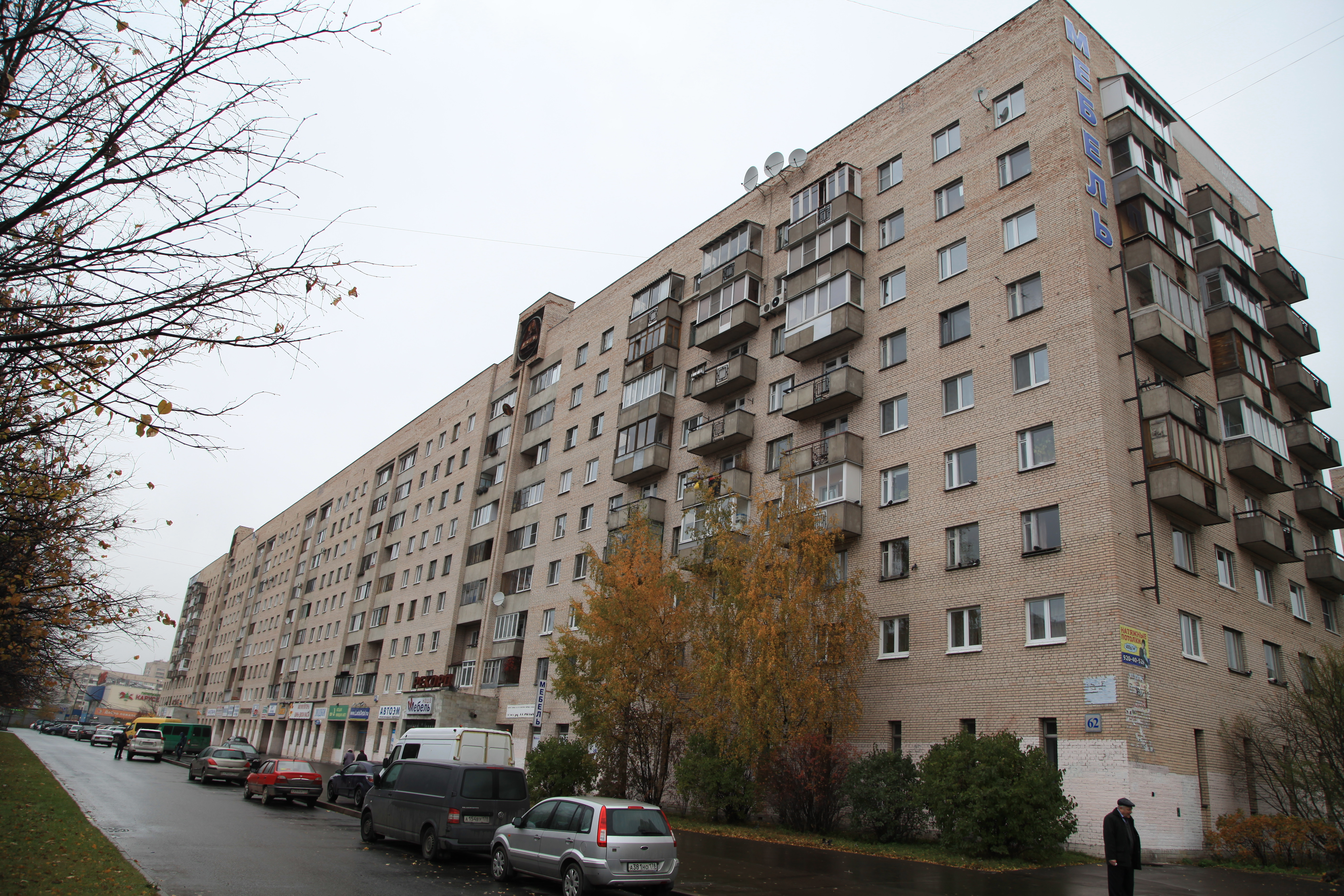 Проспект Просвещения